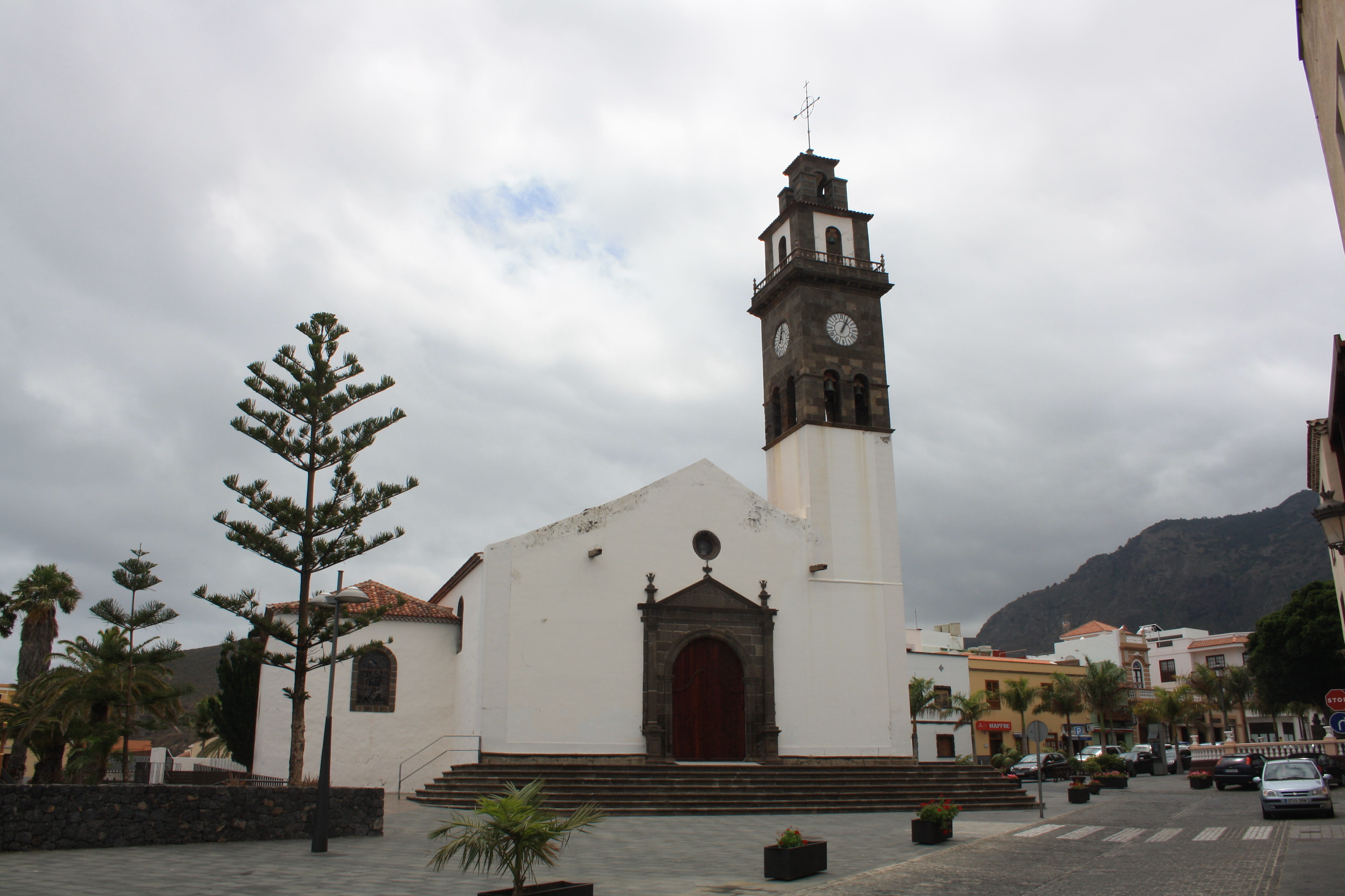 Kirche Iglesia Nuestra Señora de Los Remedios in Buenavista del Norte auf Teneriffa. Außennsicht aus NW.